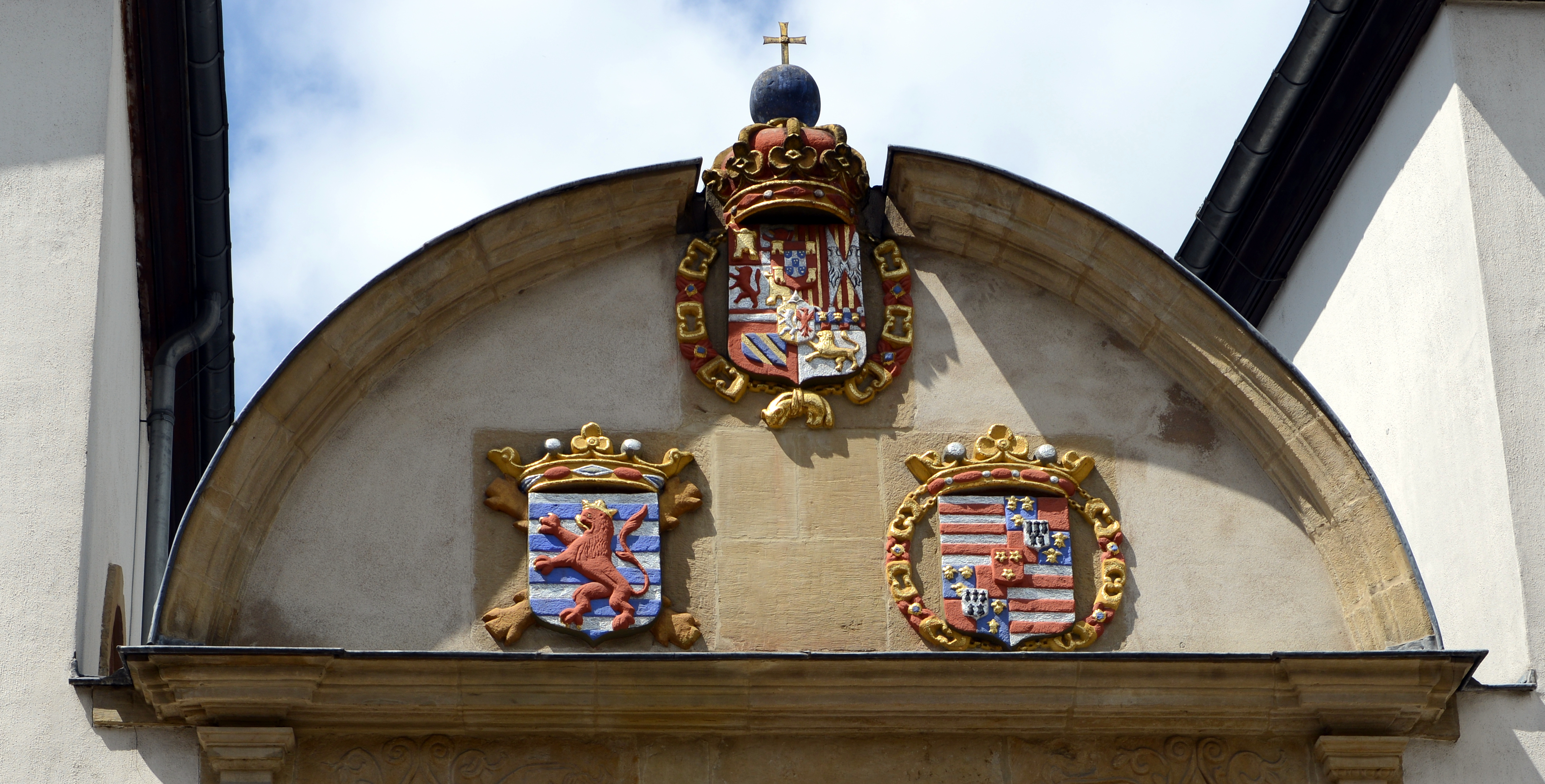 D'Wopen um Portal vum fréieren Hospice Saint-Jean am Stadgronn, wou lo den Naturmusée dran ass. Uewen: De Wope vum Carlos II. (1661-1700), Kinnek vu Spuenien a Souverain vu Lëtzebuerg. Lénks: De Wope vum Herzogtum Lëtzebuerg. Riets: De Wope vum Philippe de Croy-Ligne, Gouverneur vu Lëtzebuerg vu 1654 bis zu sengem Doud 1675.